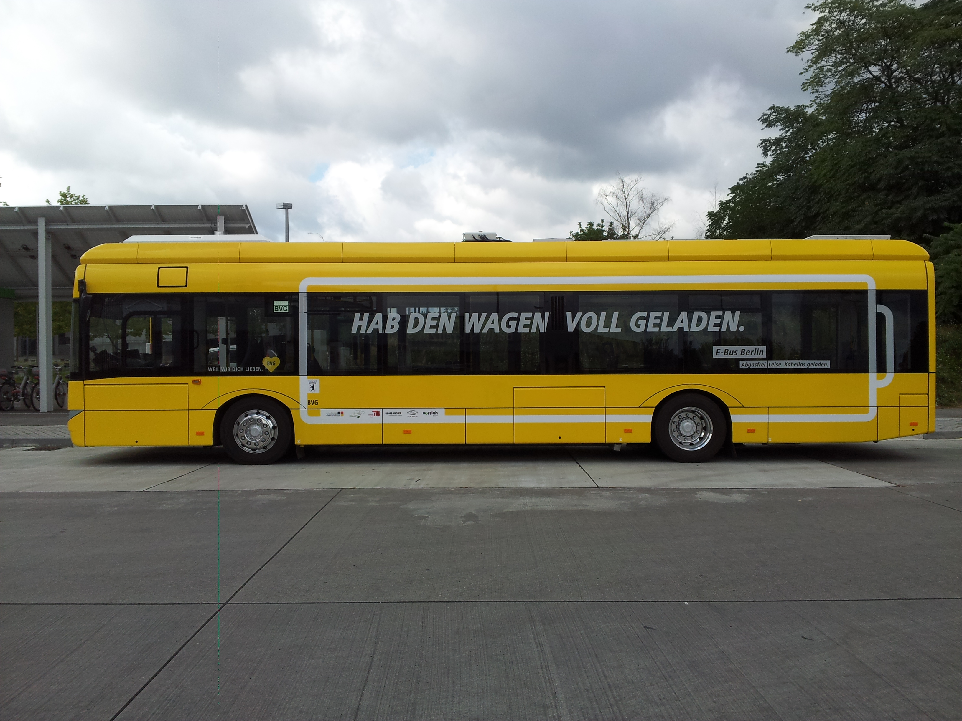 An der Ladestation am Bahnhof Berlin Südkreuz